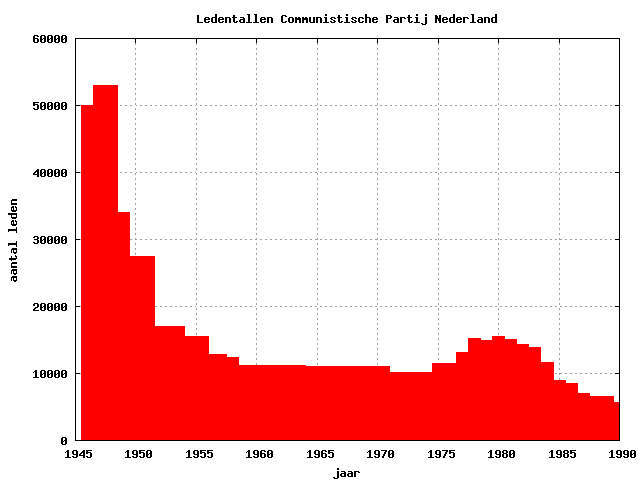 Met gnuplot op basis van DNPP-informatie geproduceerde plot, door Gerrit Holl aan het publiek domein geschonken